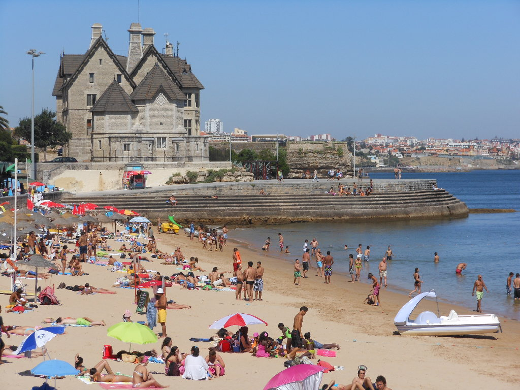 Cascais Beach